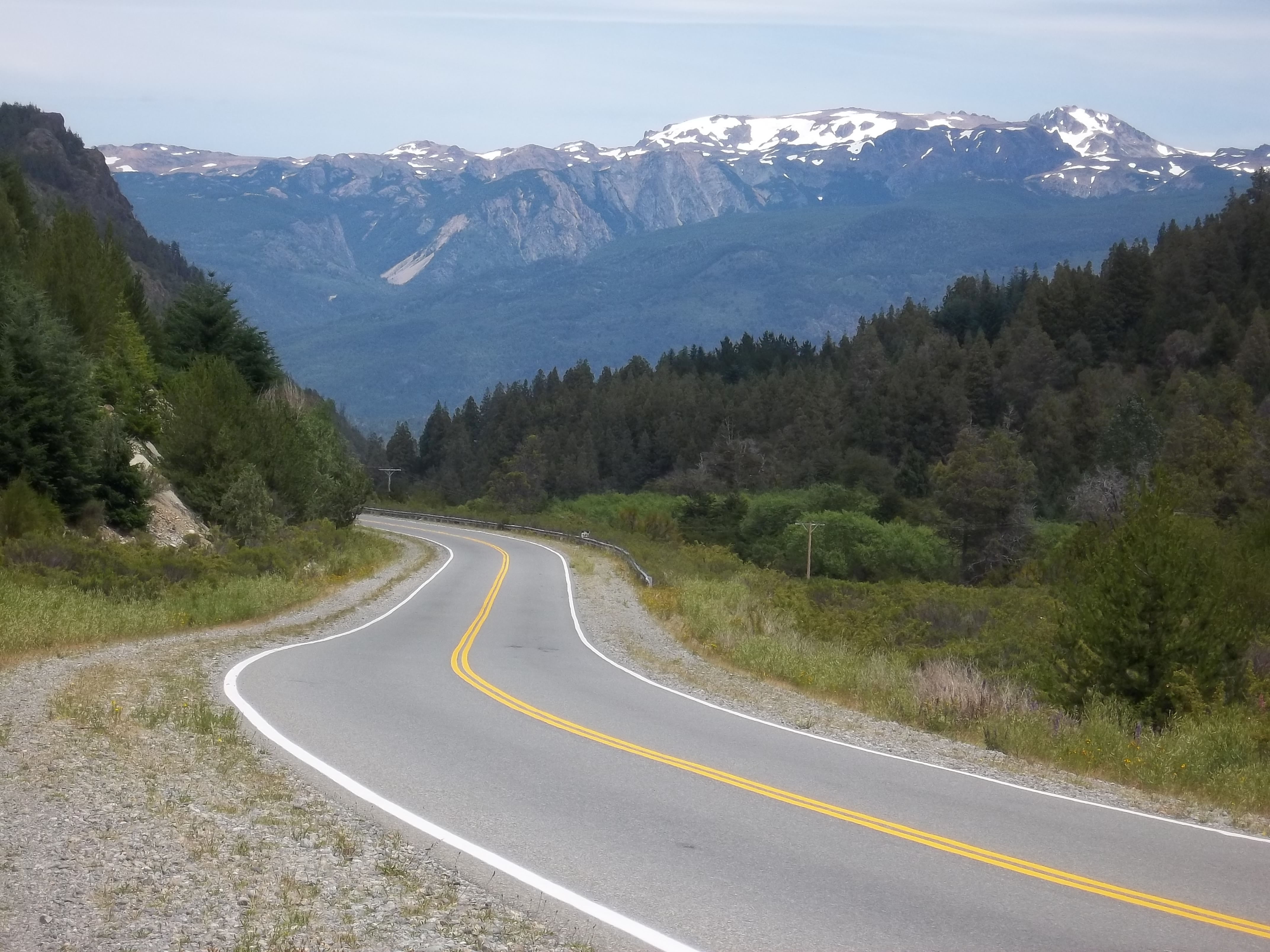 Ruta Nacional 40 km 1930 en el departamento Bariloche, provincia de Río Negro, Argentina.